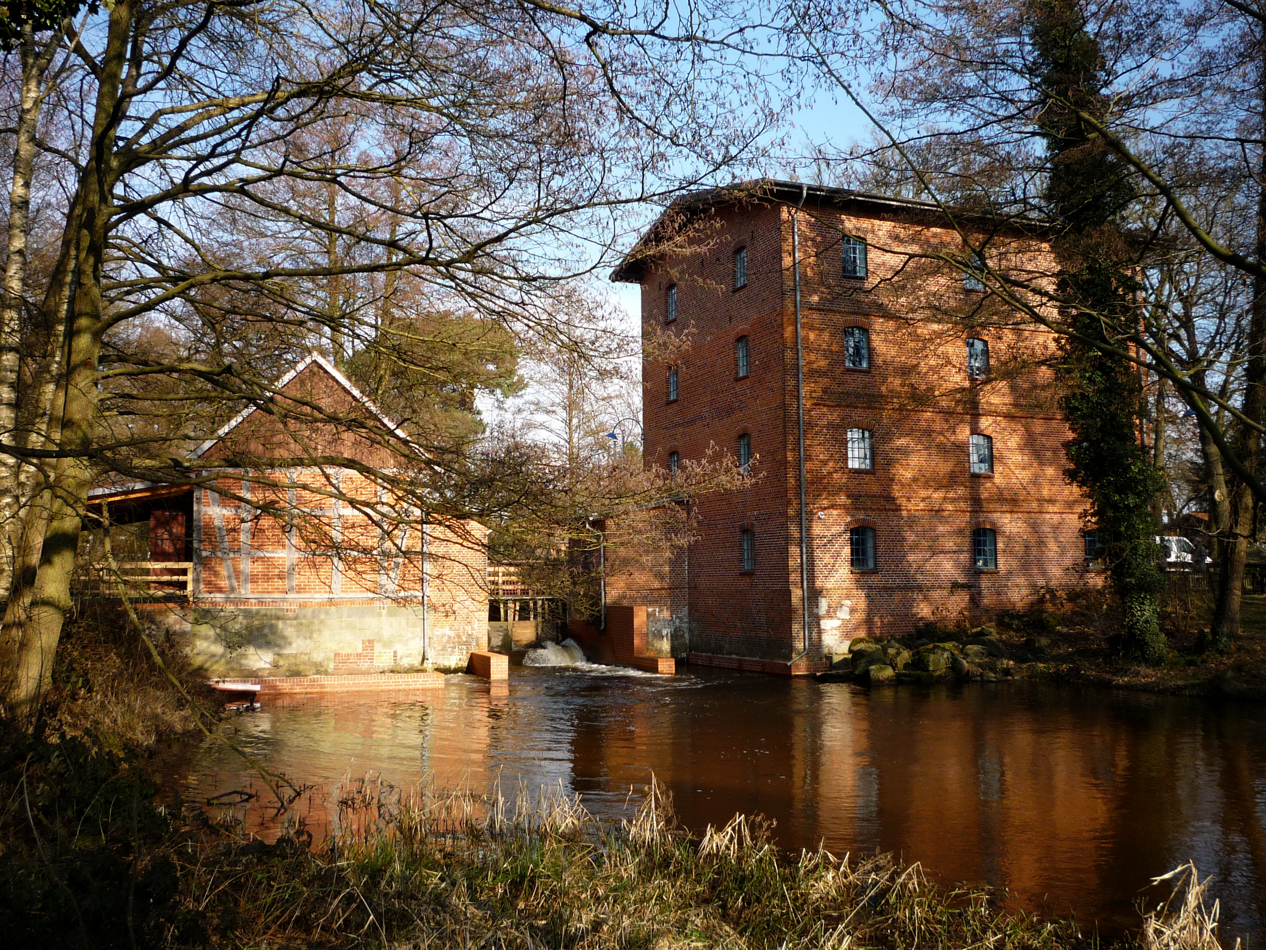 Historische Wassermühle in Müden (Örtze) mit Touristinformation.